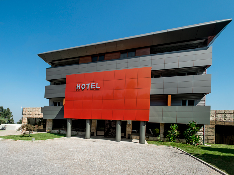 Paredes Design Hotel